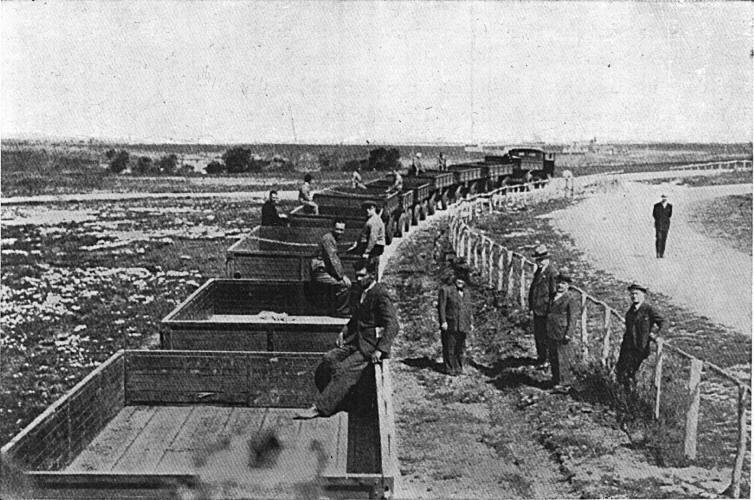 Guidovia sperimentale Ciocca, Roma ([1])